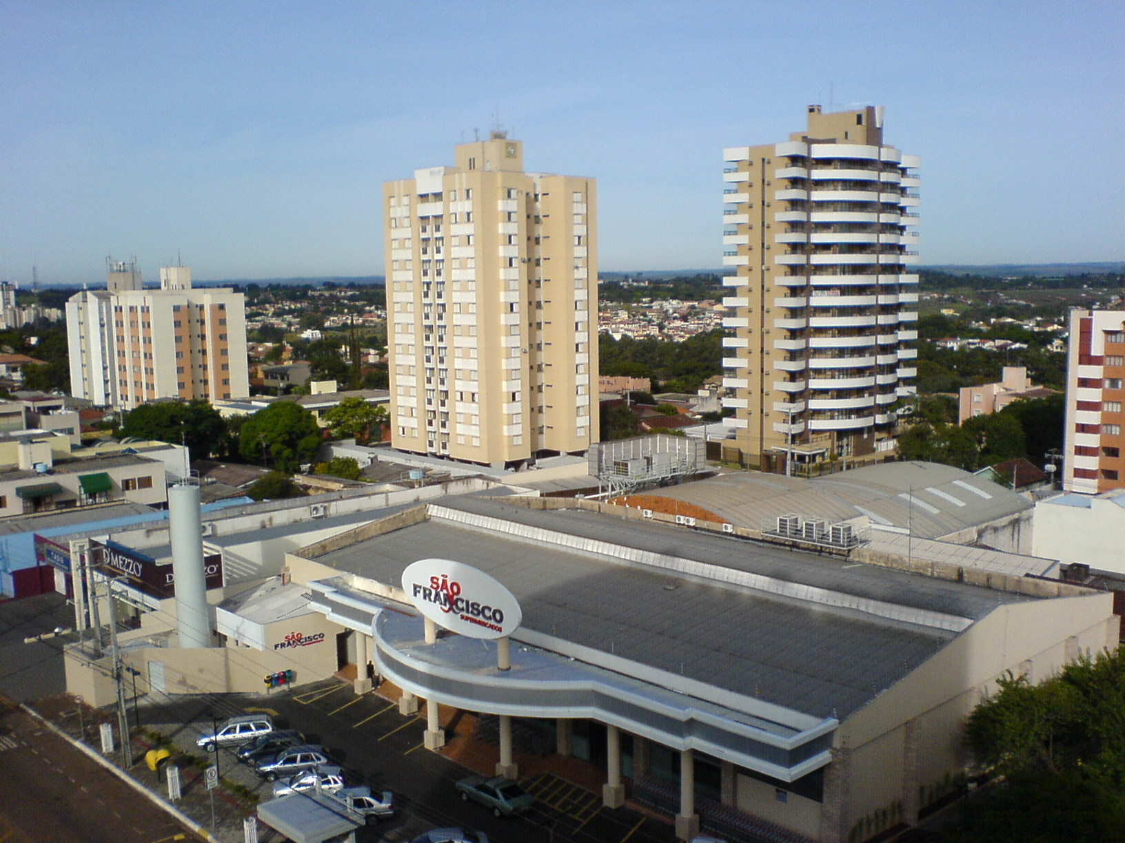 Vista do Edifício Aquarela